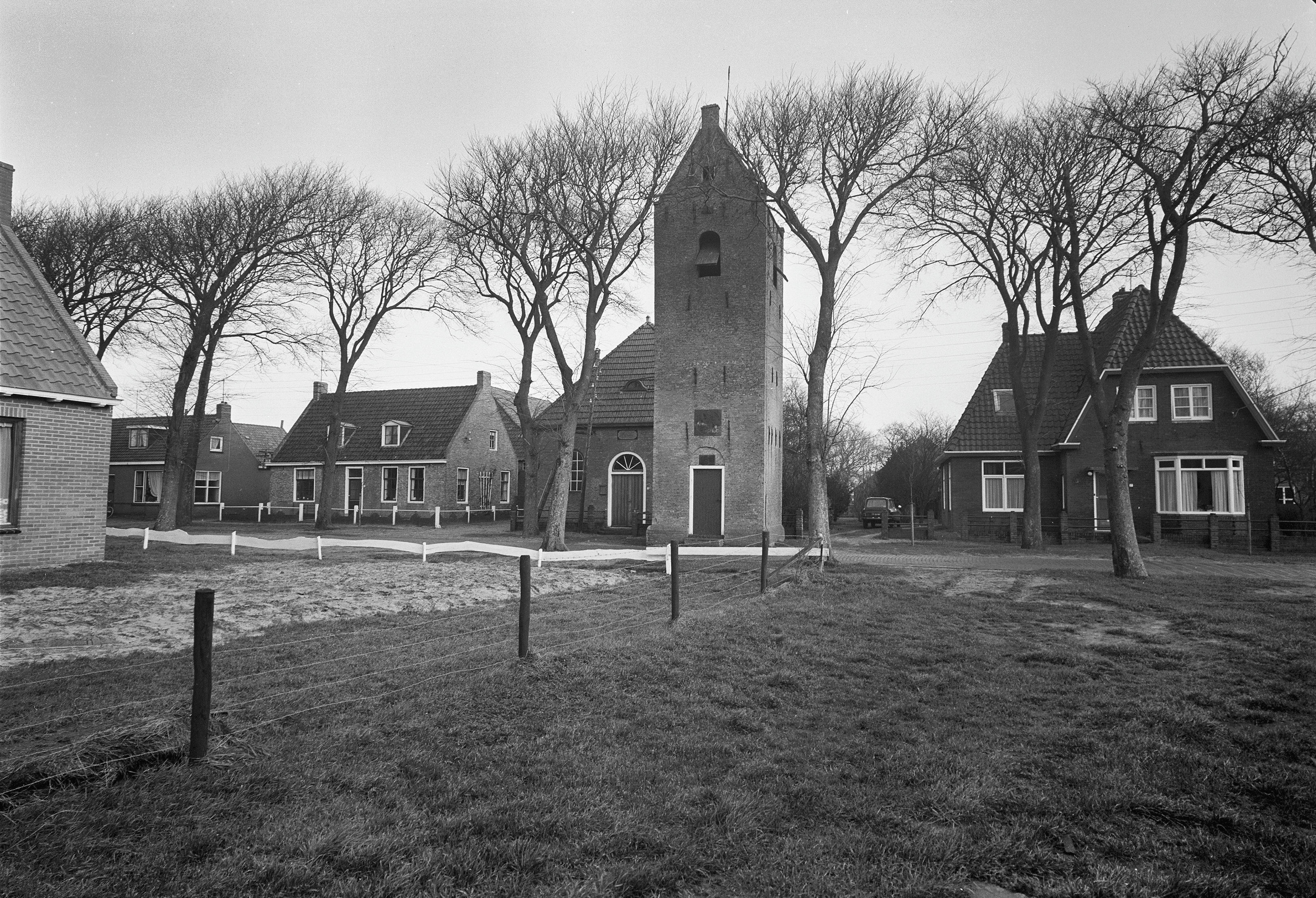 Overzichten + plattegronden: Camminghastraat 12-14-16